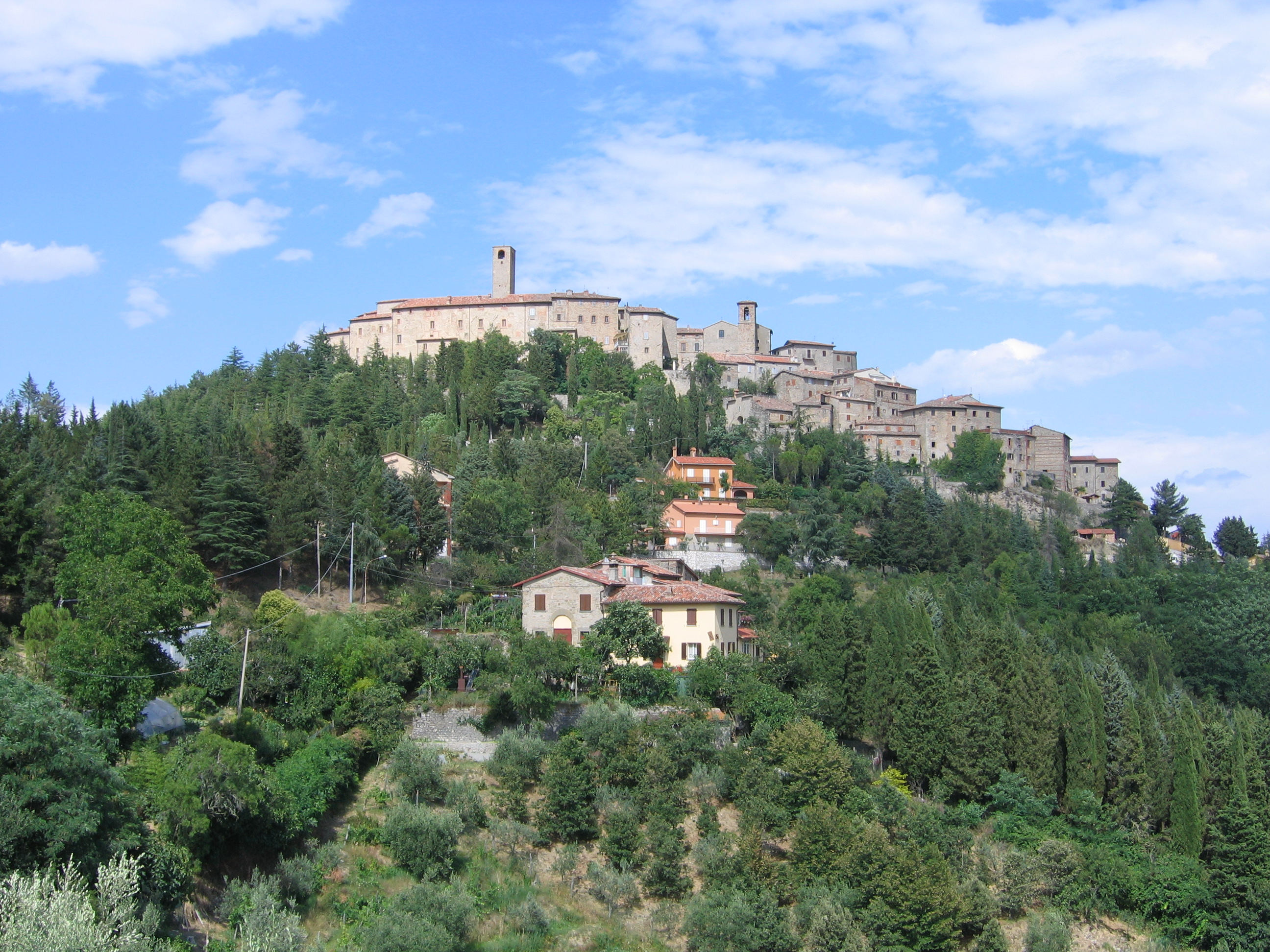 Panorama del paese medioevale